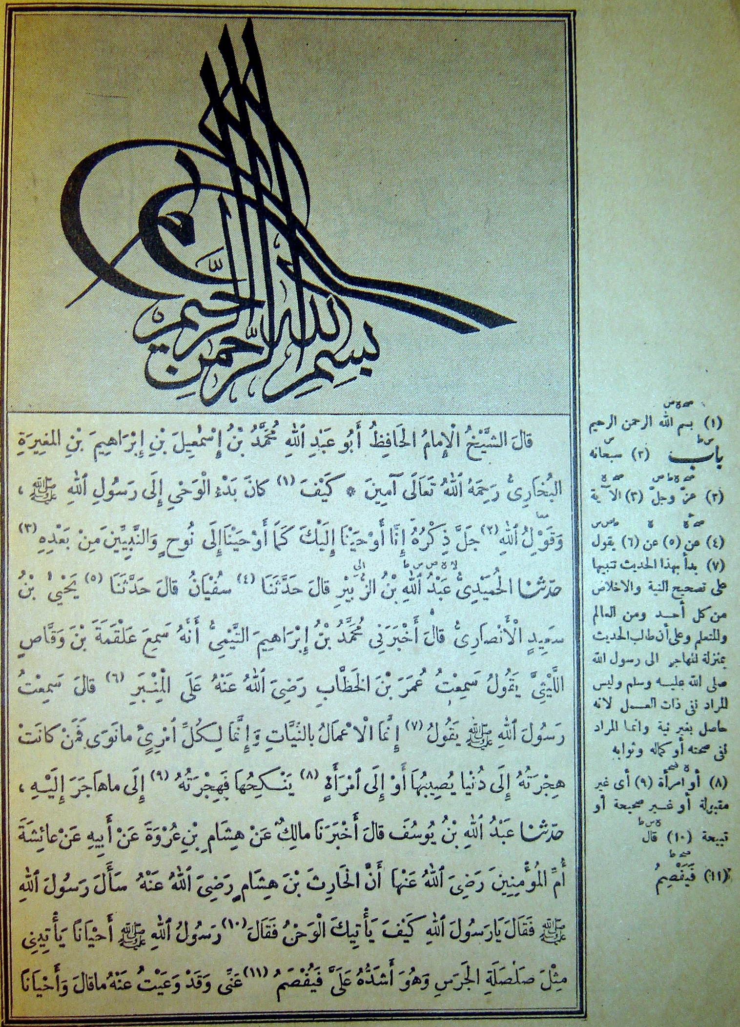 Foto von der Originalausgabe Bulaq (19. Jh.) Originalausgabe: Privatbesitz Orientalist